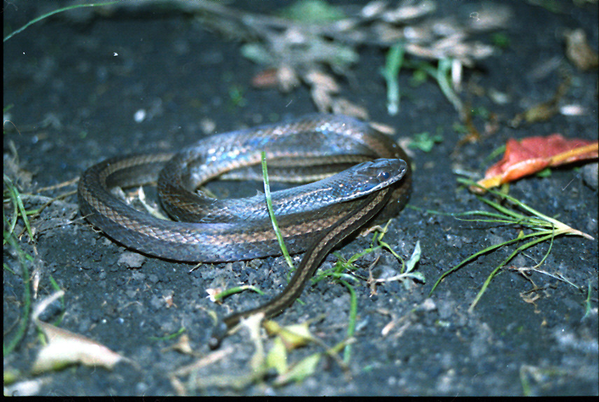 Coniophanes fissidens